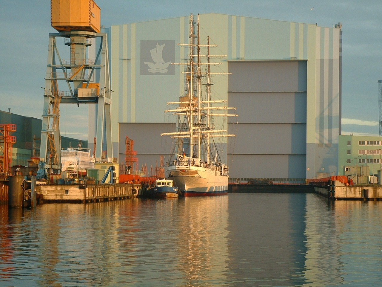 Die GORCH FOCK vor der Volkswerft, am Tag ihrer Taufe